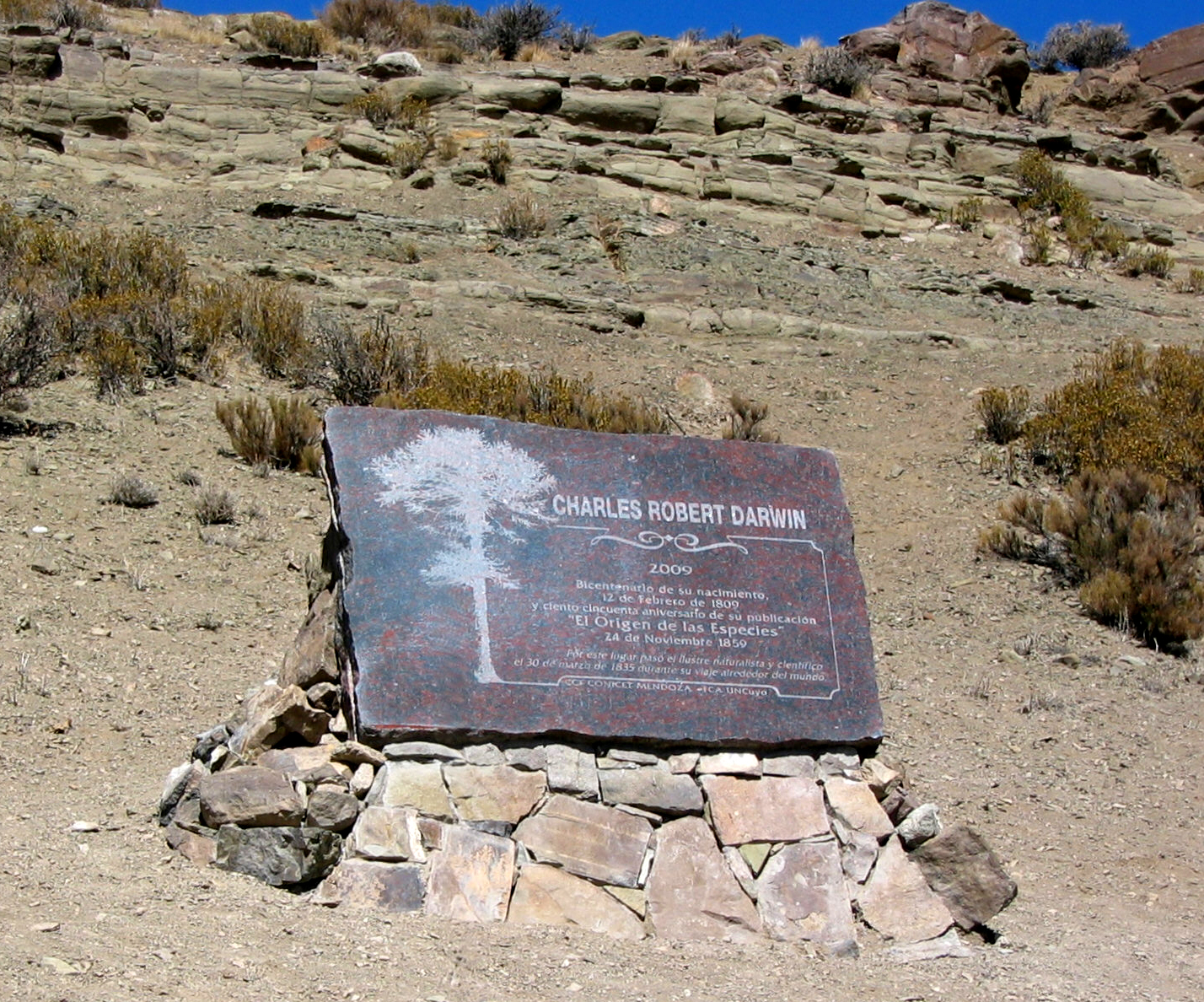 Nuevo monumento en el Bosque Fósil de Araucarias de Darwin, que reemplazó al de 1959